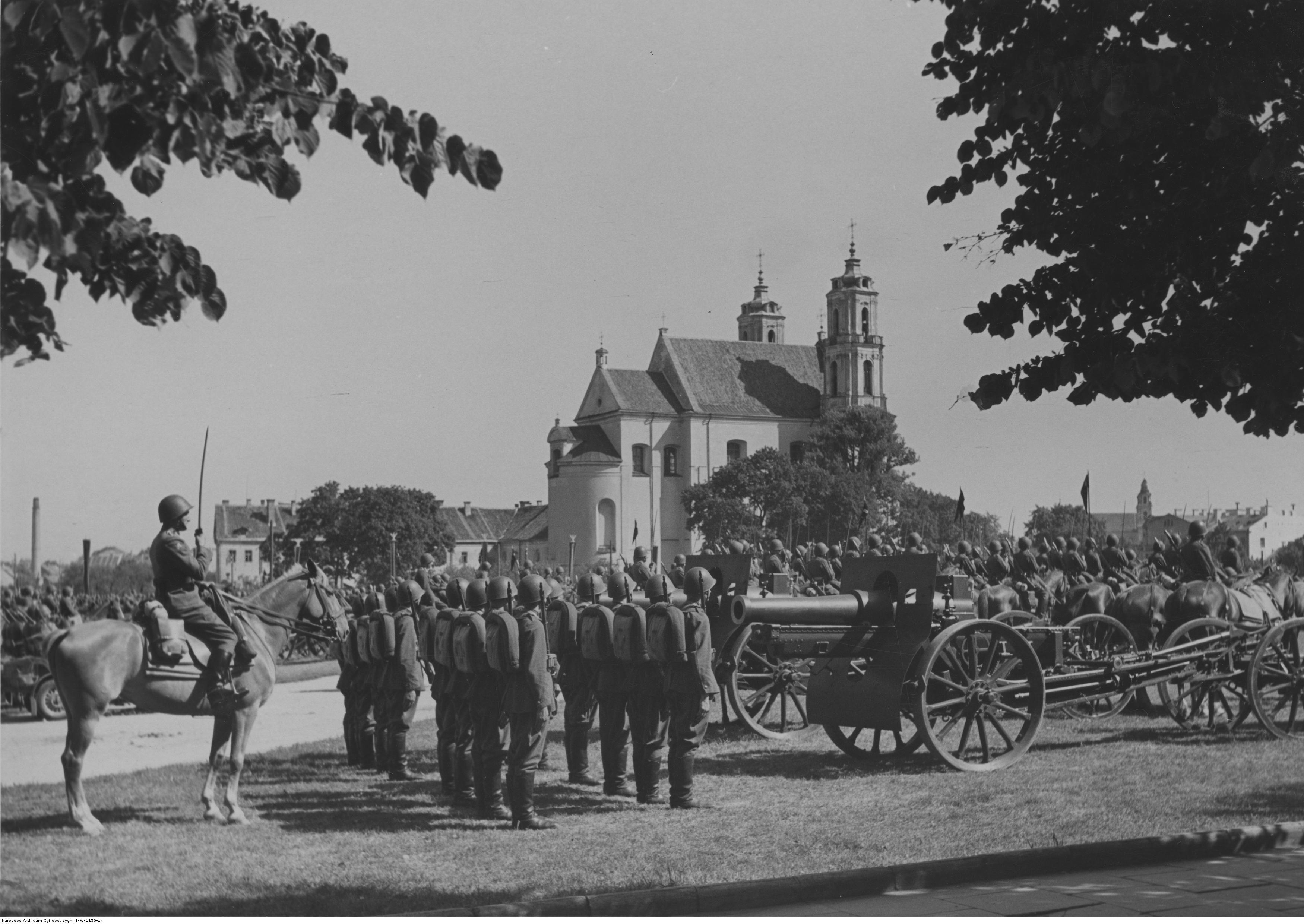 Jubileusz dwudziestopięciolecia 1. Dywizji Piechoty Legionów w Wilnie. Fragment uroczystości na placu Łukiskim; sierpień 1939. Widoczna m.in. 155 mm haubica wz. 1917. W oddali widoczny kościół św. Jakuba i Filipa. Koncern Ilustrowany Kurier Codzienny - Archiwum Ilustracji. Sygnatura: 1-W-1150-14